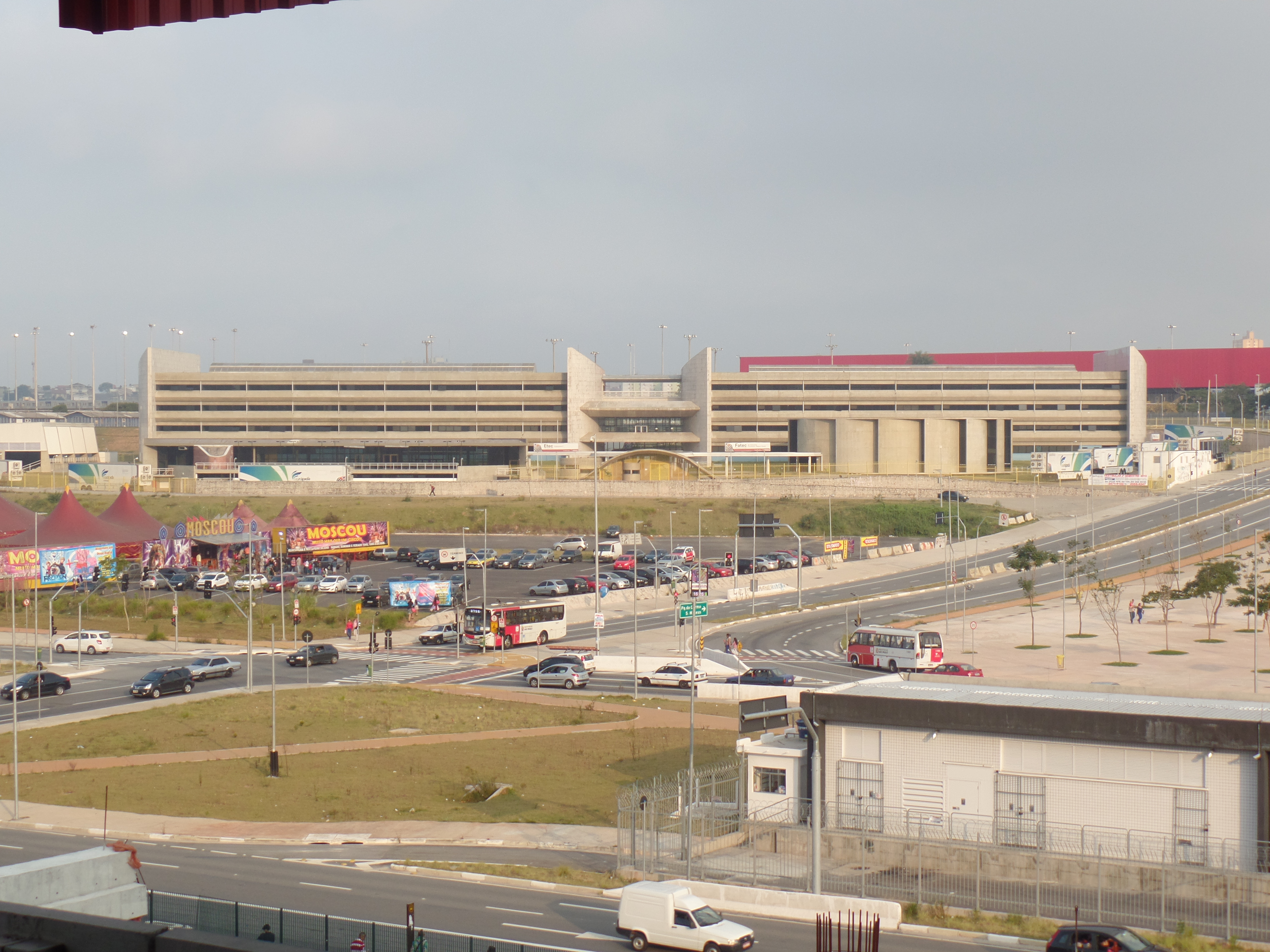 Artur Alvim, São Paulo - State of São Paulo, Brazil